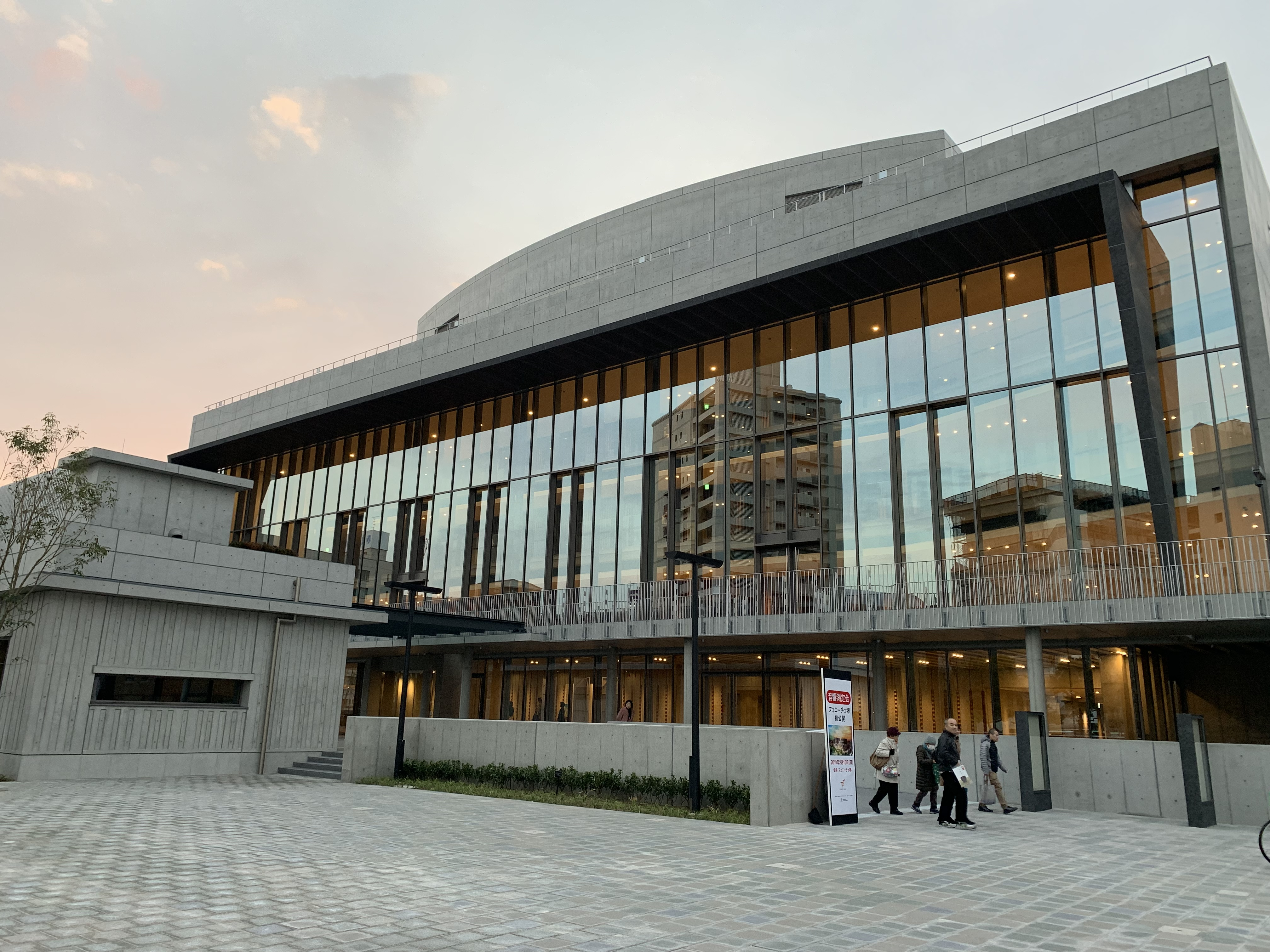 フェニーチェ堺外観